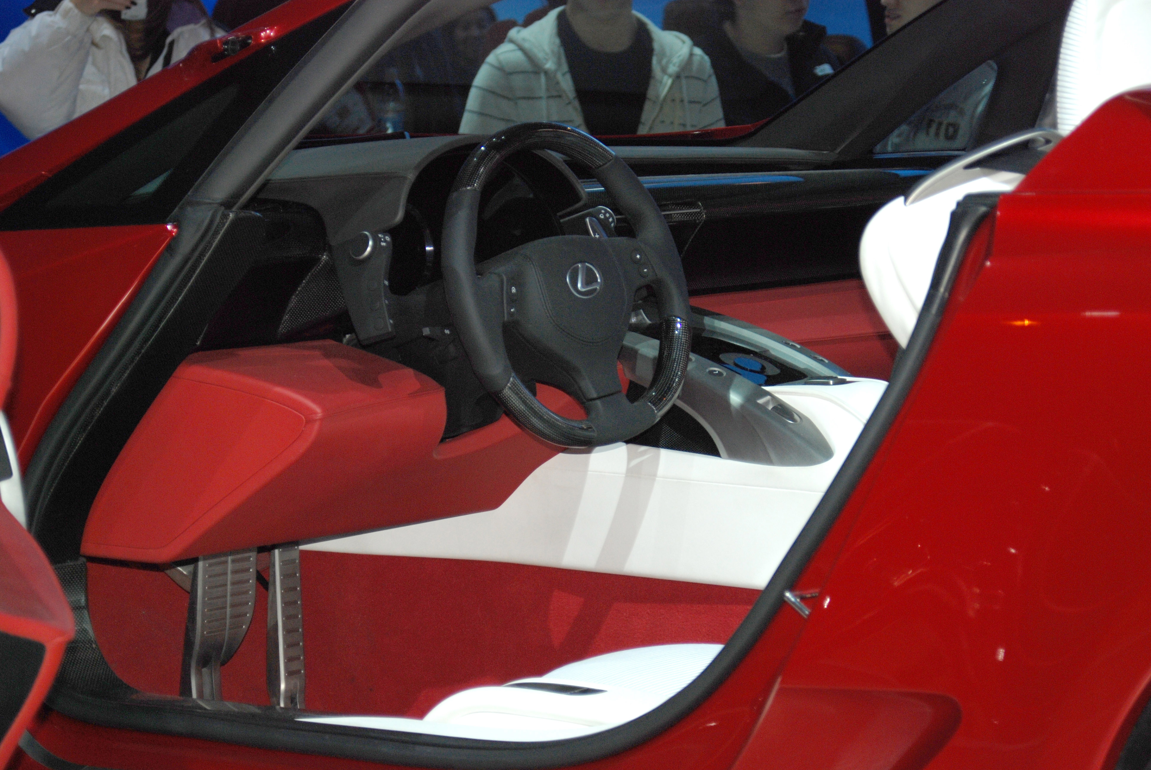 LF-A Roadster